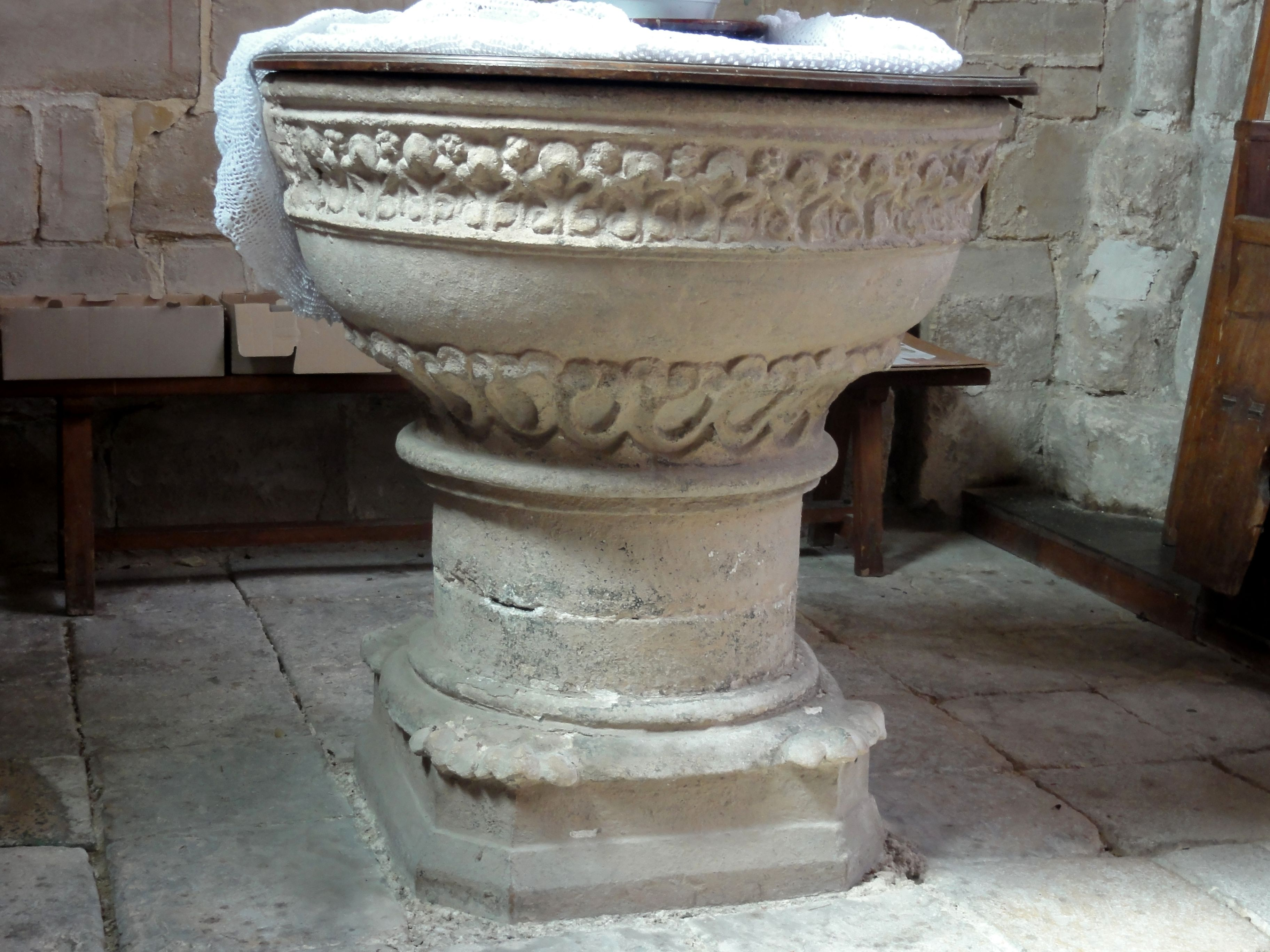 Fonts baptismaux.